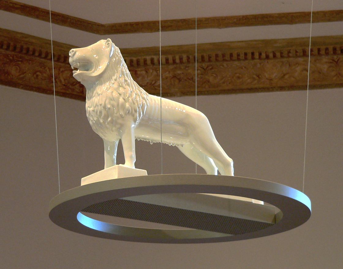 Wiki Loves Jules Verne, Braunschweiger Löwe aus Fürstenberger Porzellan